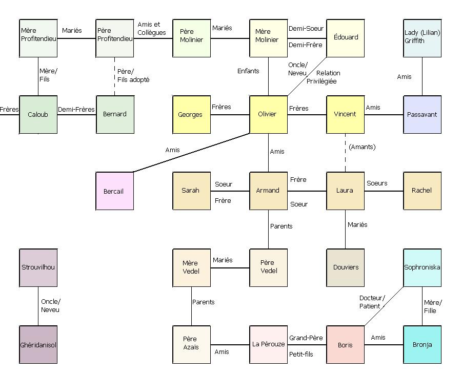 Arbre relationnel des Faux Monnayeurs Il faudrait rajouter le lien entre Vincent et Lilian, ils sont également amants, ainsi que Sarah et Bernard. De plus Strouvilhou est en relation avec Passavant, tandis que Ghéridanisol et Boris sont camarades de classe de George. il manque aussi Cécile et Charles les deux autres frère et sœur de Bernard. Licensing Catégorie:Schémas La relation d'amitié entre Bernard et Olivier est aussi très forte.